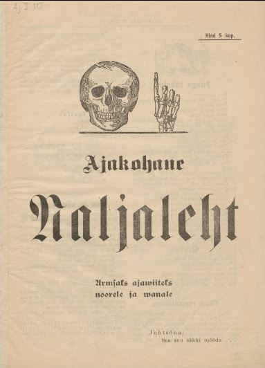 Ajakohane Naljaleht 1906 esikaas